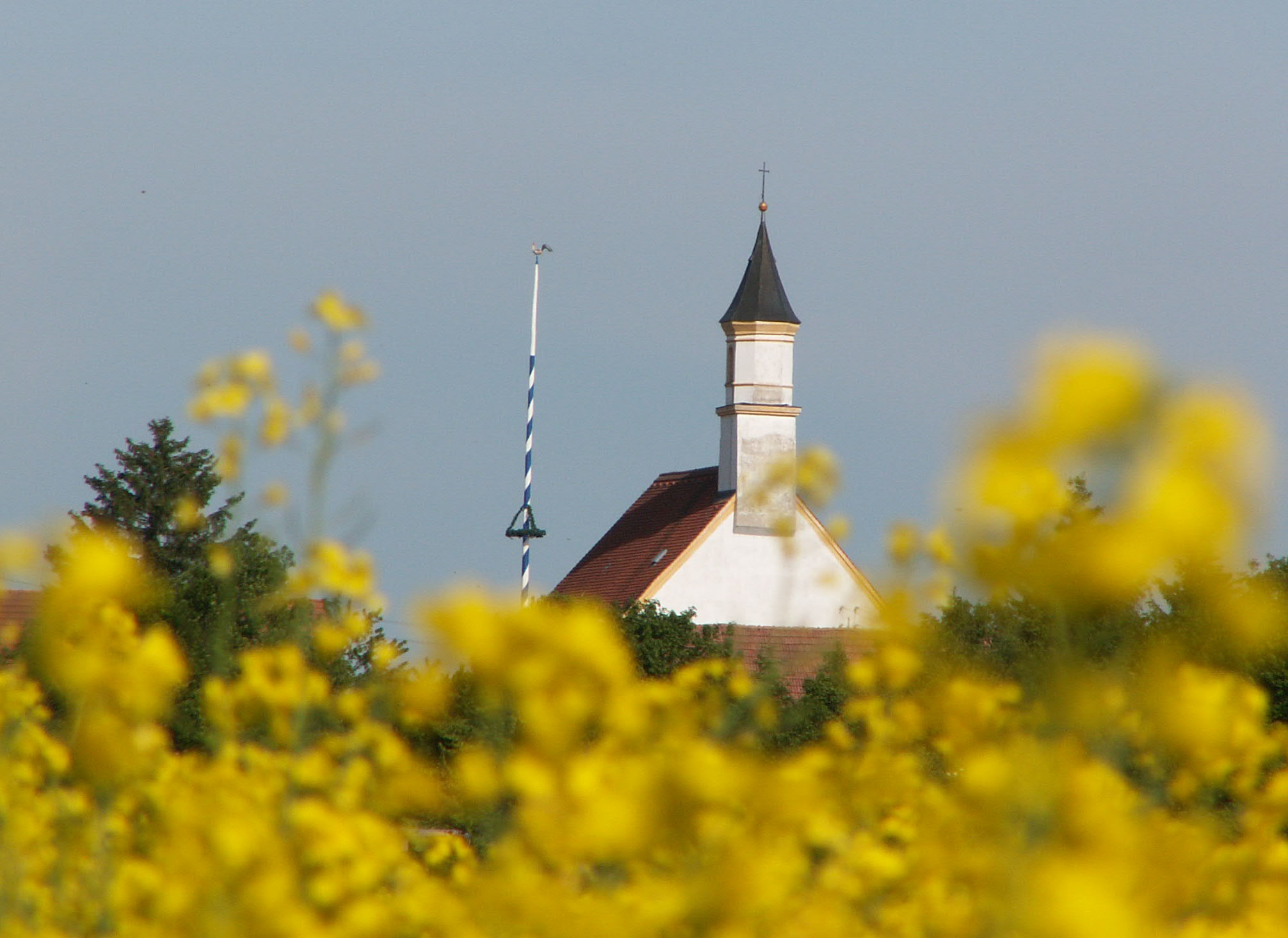 Katholische Filialkirche St. Pankratius in Ramsach, Penzing